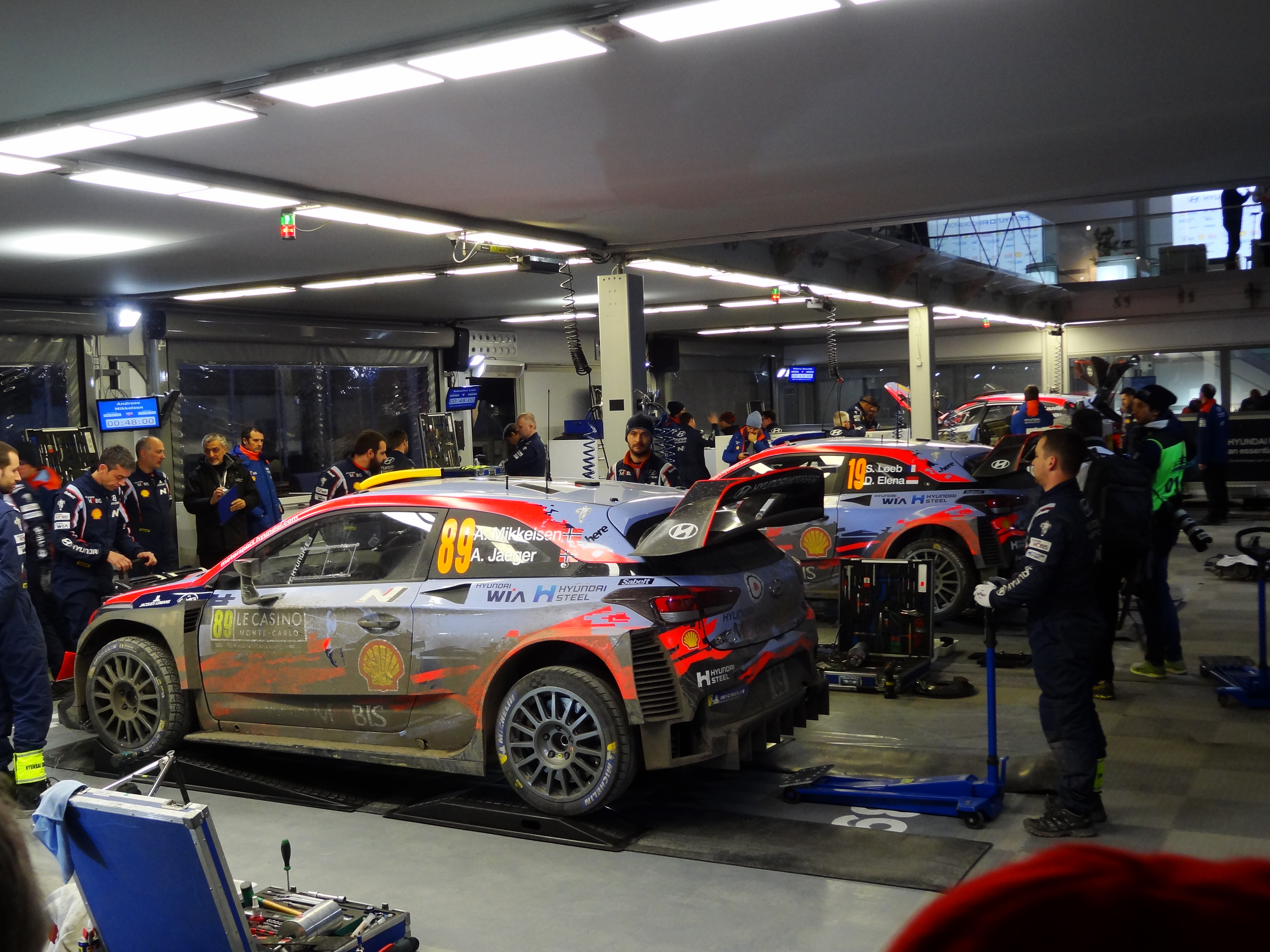 au Rallye Monte-Carlo 2019.